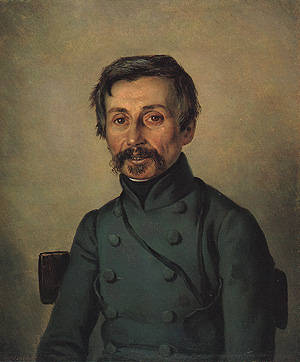 Якушкин И. Д. (1851)